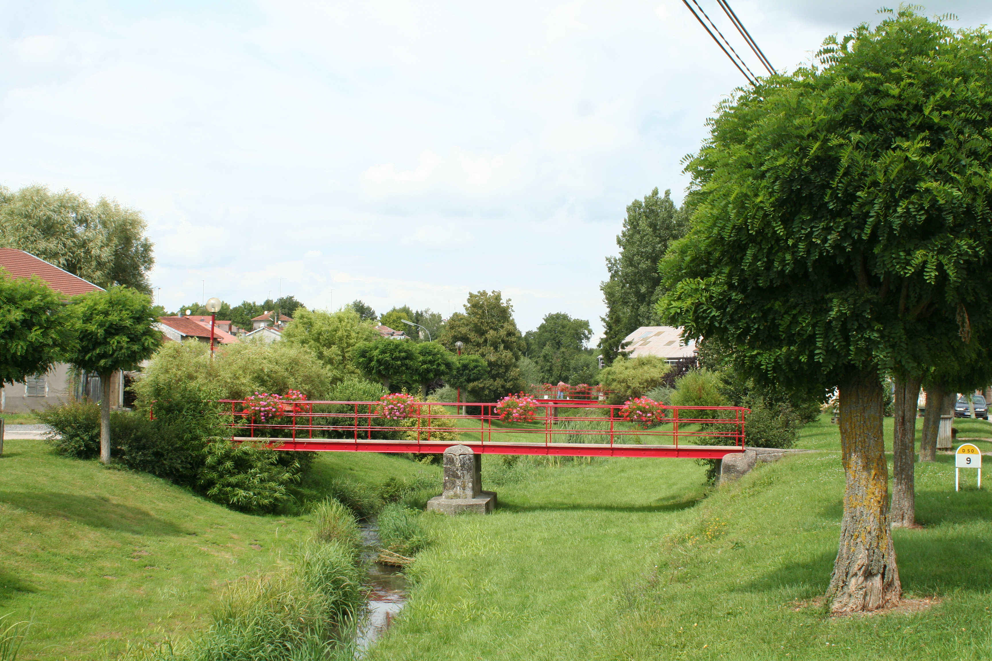 Passerelles sur le ruisseau de la Nauve à Saint-Maurice-sur-Mortagne (Vosges)